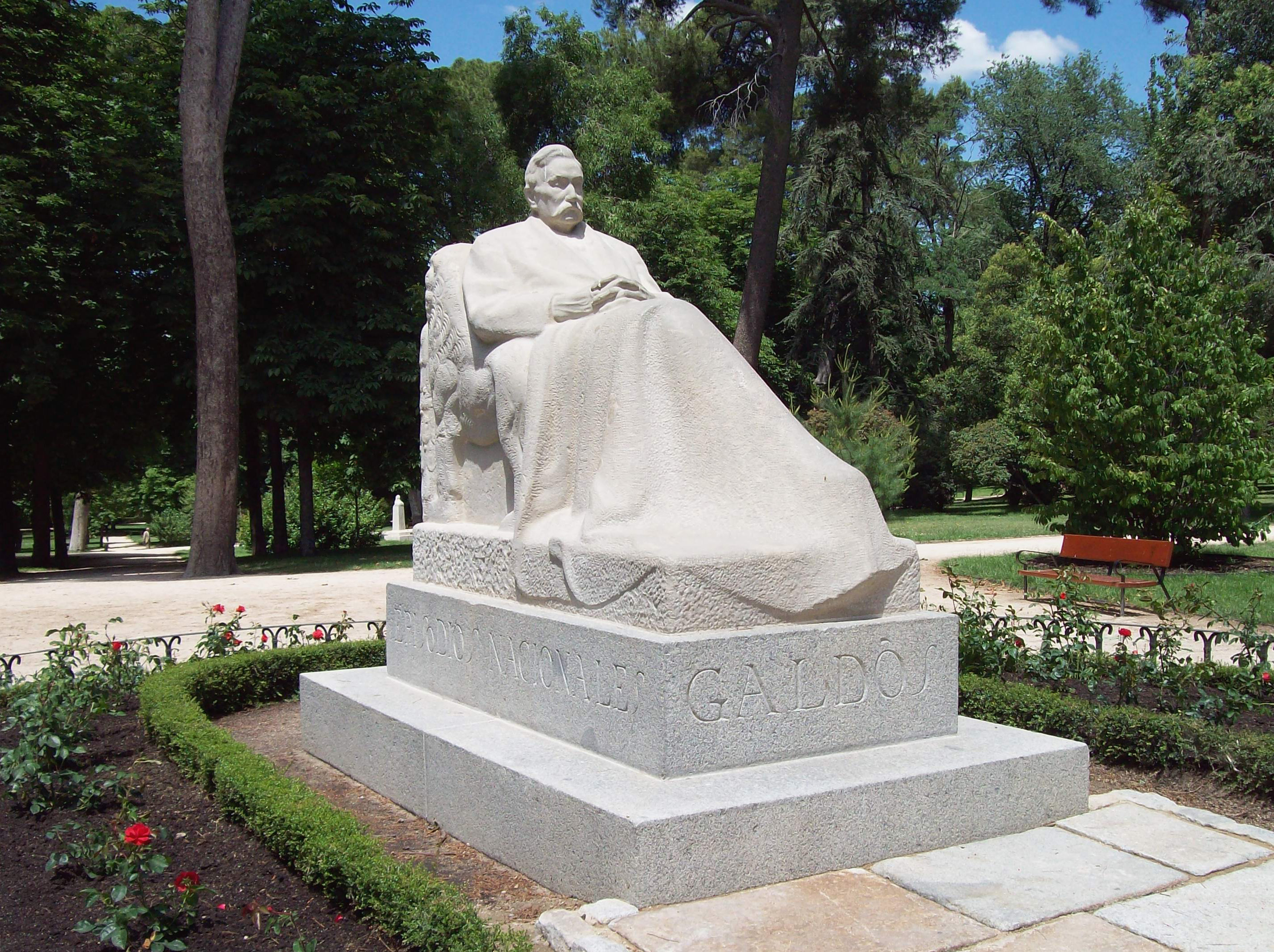 Monument to Benito Pérez Galdós